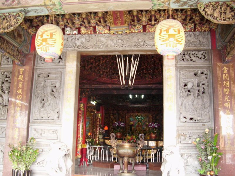 Fushun Temple, Longjing District, Taichung.